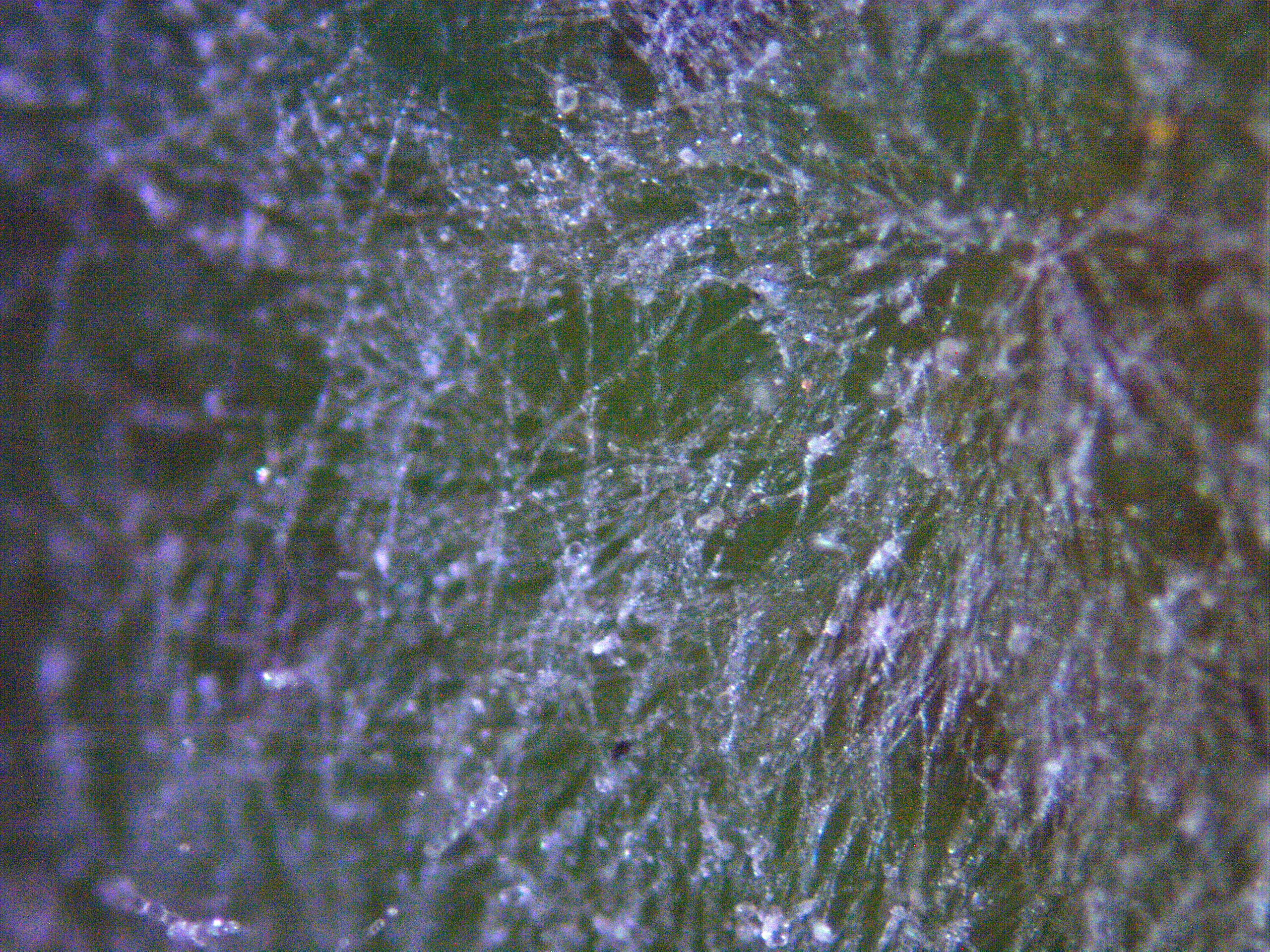 Echter Mehltau Uncinula tulasnei on Acer platanoides